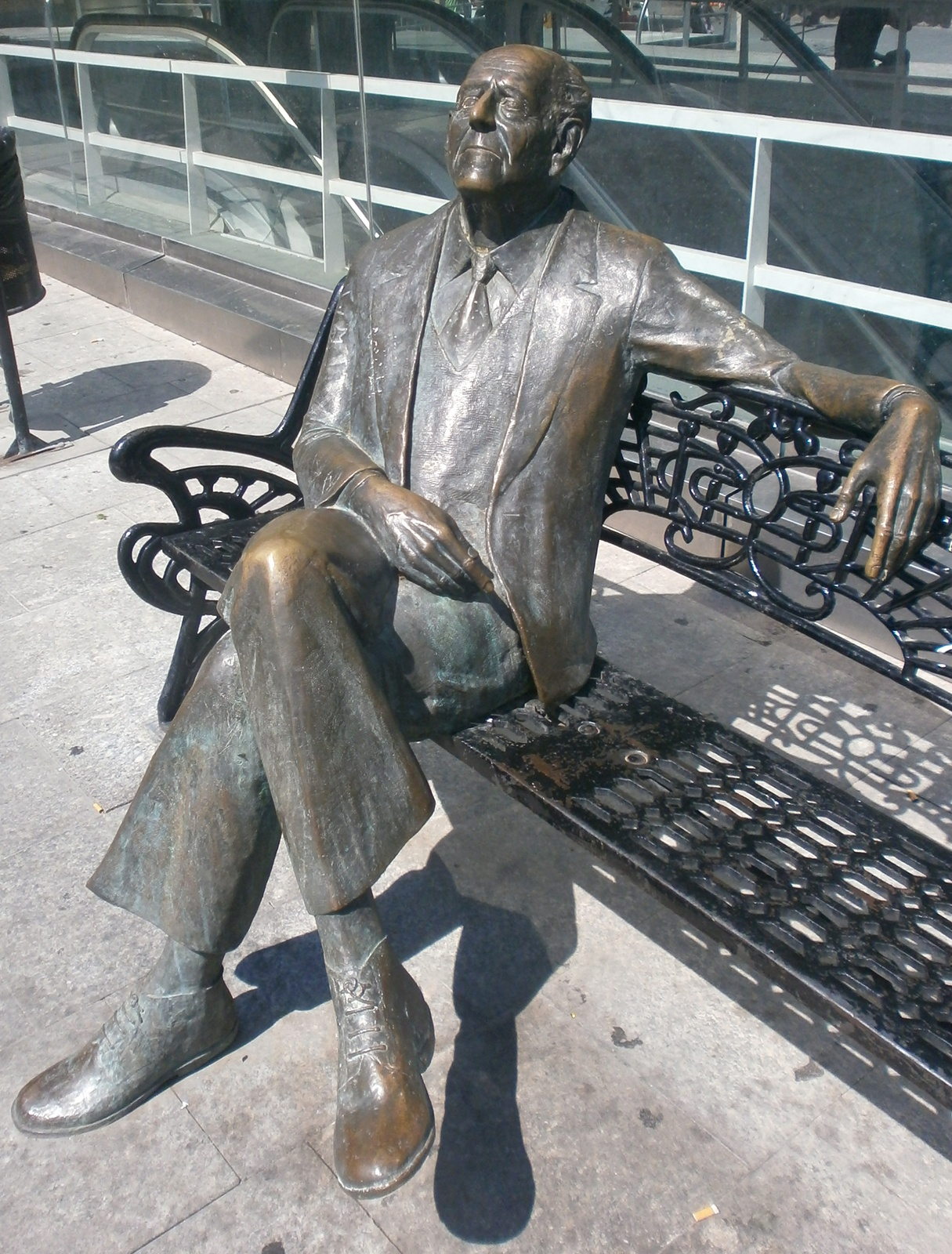 Estatua del pintor y escultor español Gastón Castelló en la plaza 25 de mayo, Alicante (España)